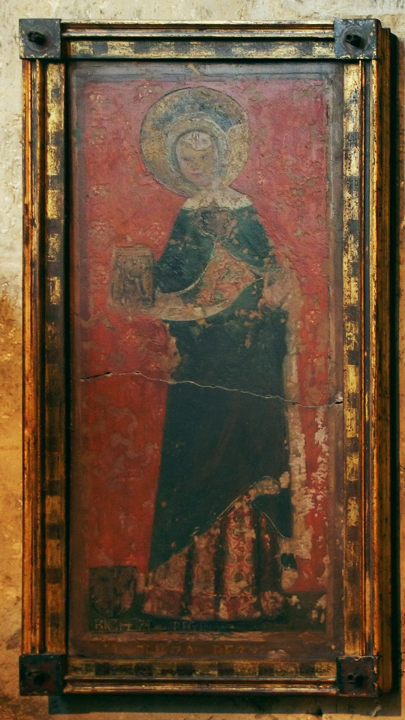 Bildnis der Richeza (Polen) in der Johanneskapelle im Kölner Dom rechts neben der Begräbnisstelle